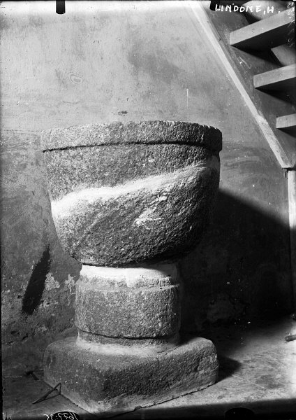 Dopfunt, av oren täljsten, 1200-tal. Kategori: (04) DopfuntarDopfunt, av oren täljsten, 1200-tal.